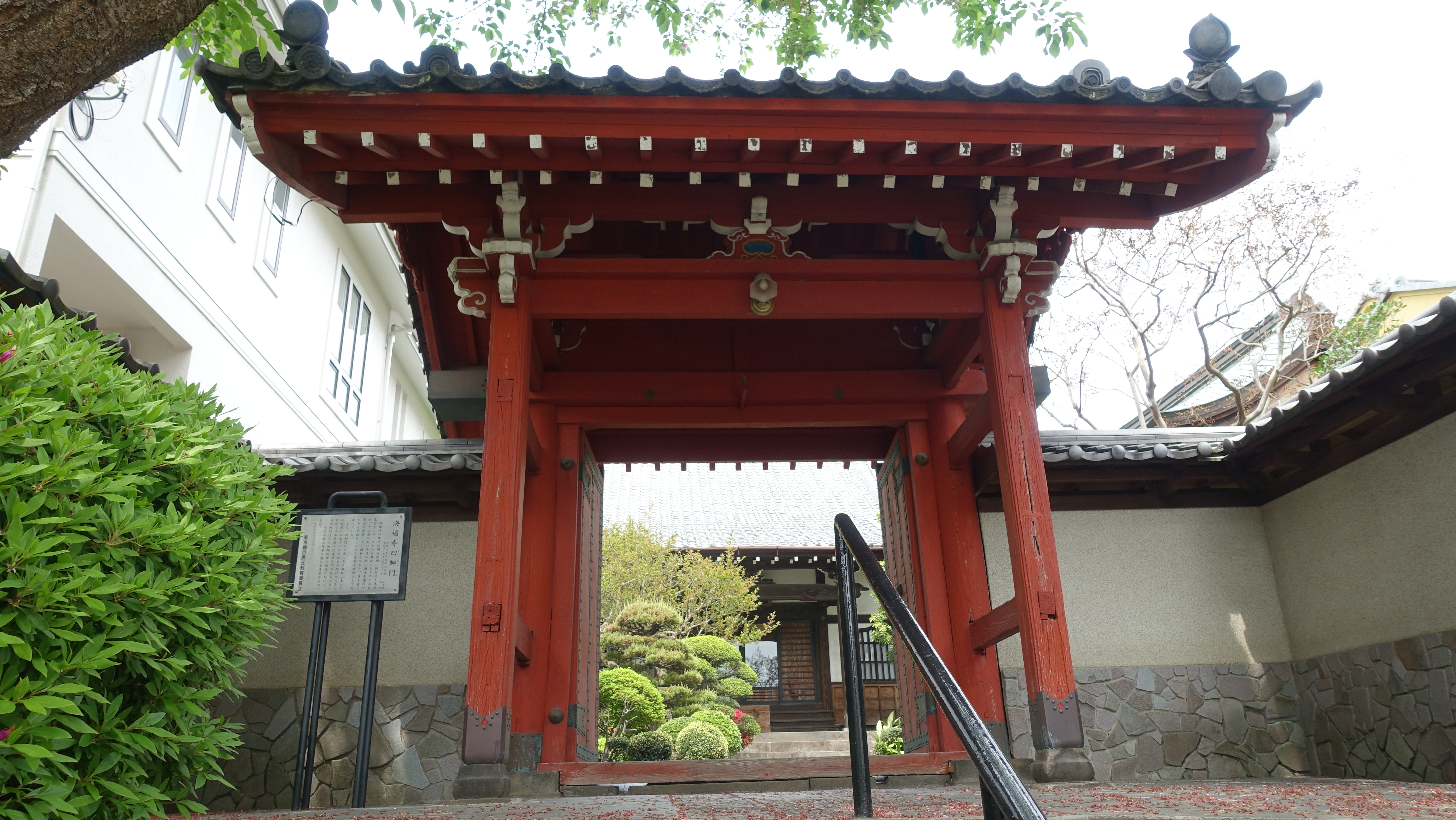 海福寺四脚門